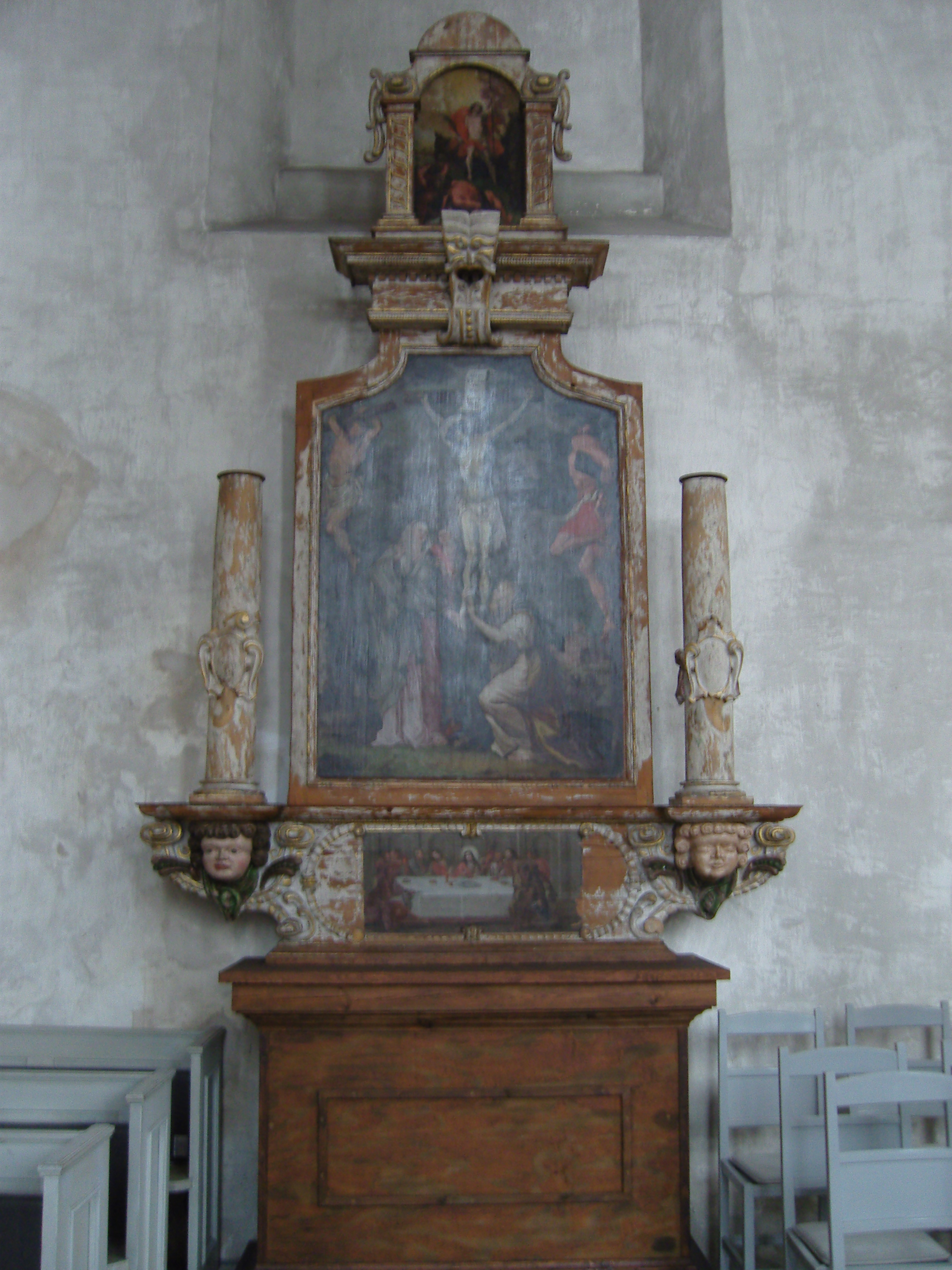 Altar in der Peter-und-Paul-Kirche in Senftenberg; ehemaliger Altar der Wendischen Kirche